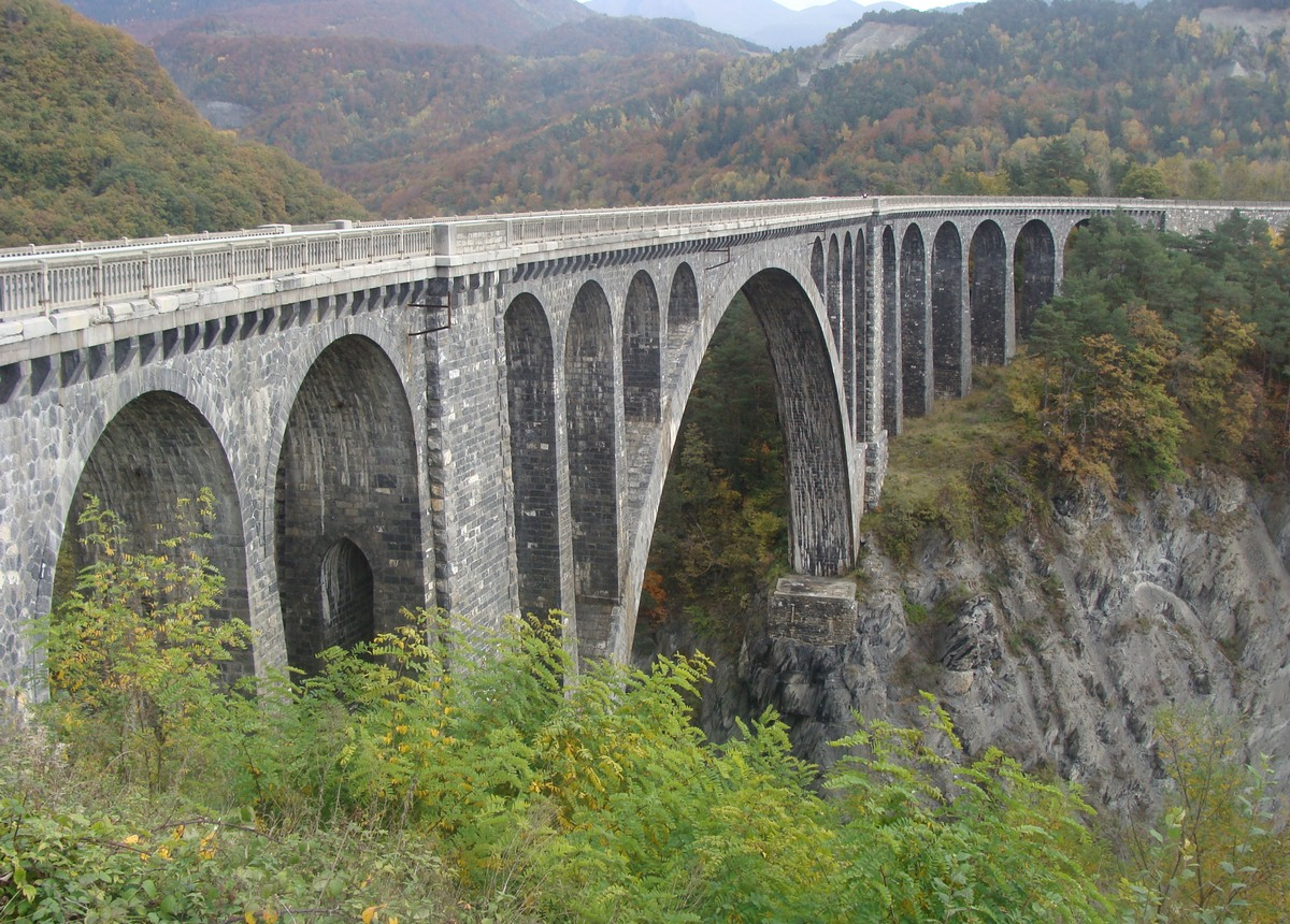 Le Viaduc de la Roizonne, vue d'ensemble depuis le nord (rive droite, côté aval).